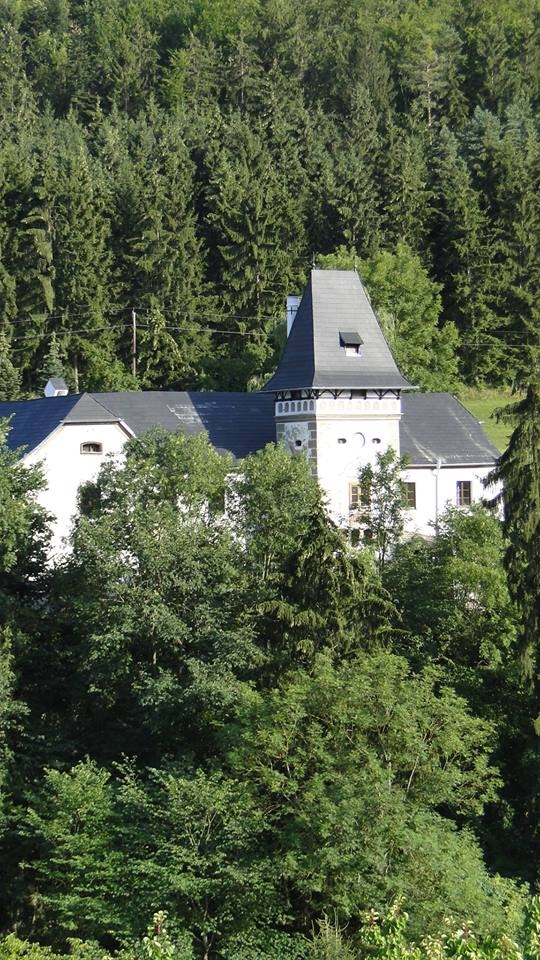 Hauptfassade mit Turm